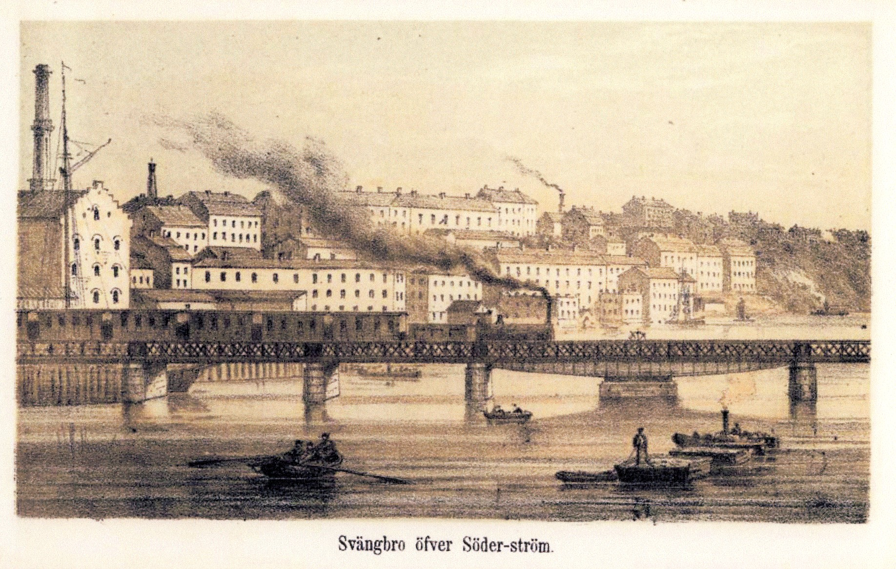 "16 Utsigter i färgtryck af sammanbindnings-banan genom Stockholm och dess utsträckning till Liljeholmen: med plan och profilkarta samt text. "